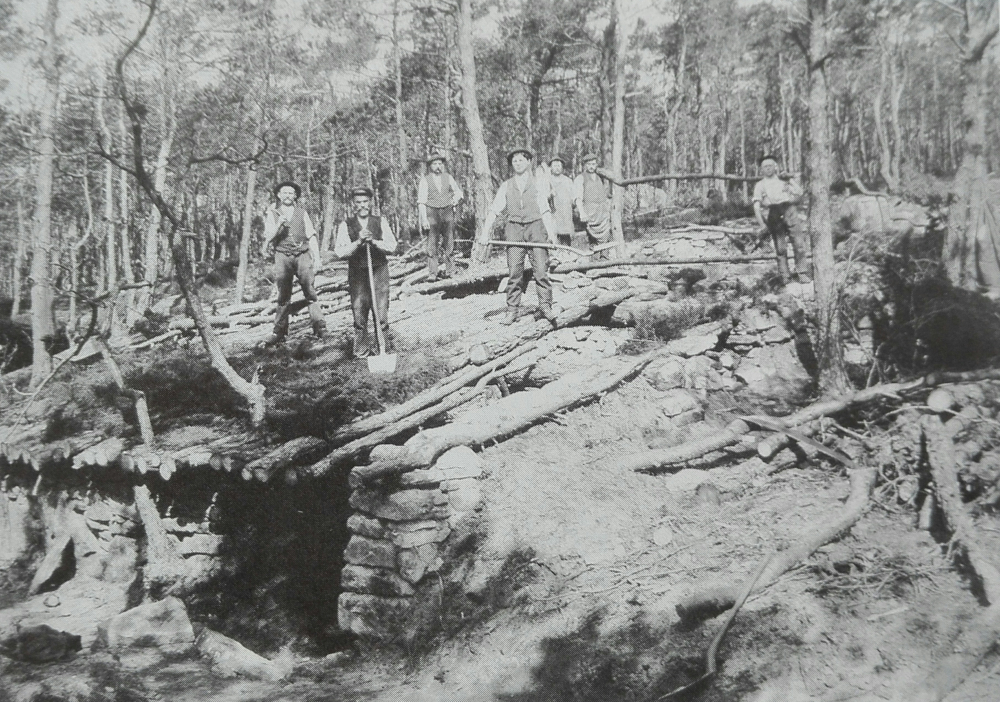 Ausgrabung der Heidenlöcher bei Deidesheim